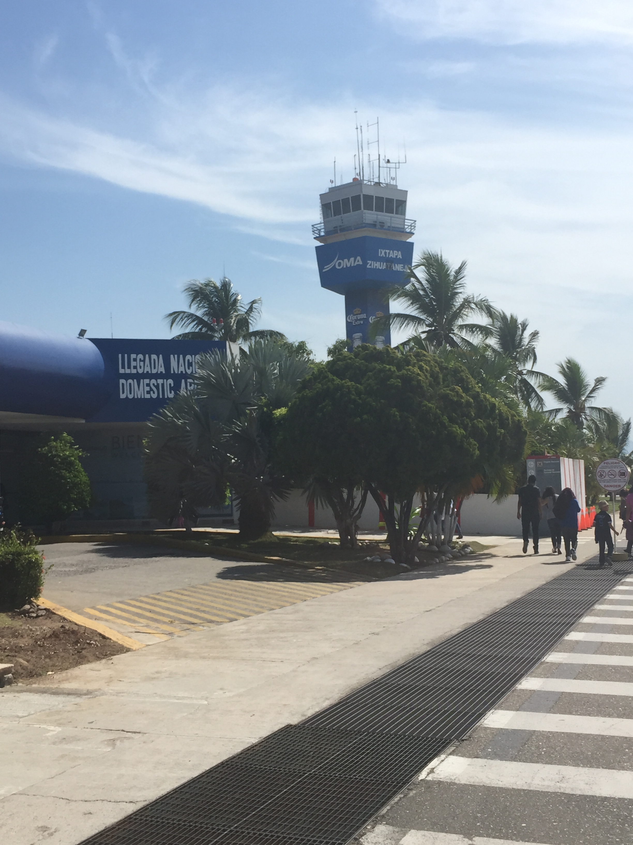 Torre de control del Aeropuerto de Ixtapa-Zihuatanejo.